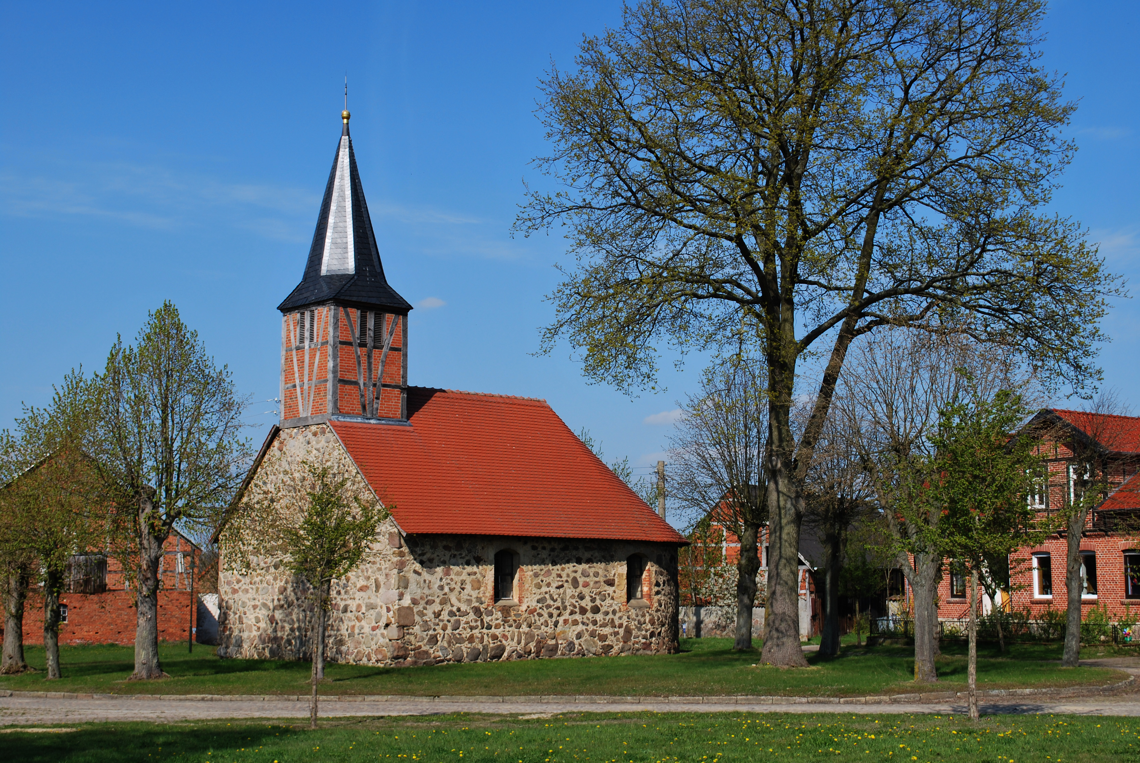 Dorfkirche in Käcklitz, Ortsteil von Beetzendorf